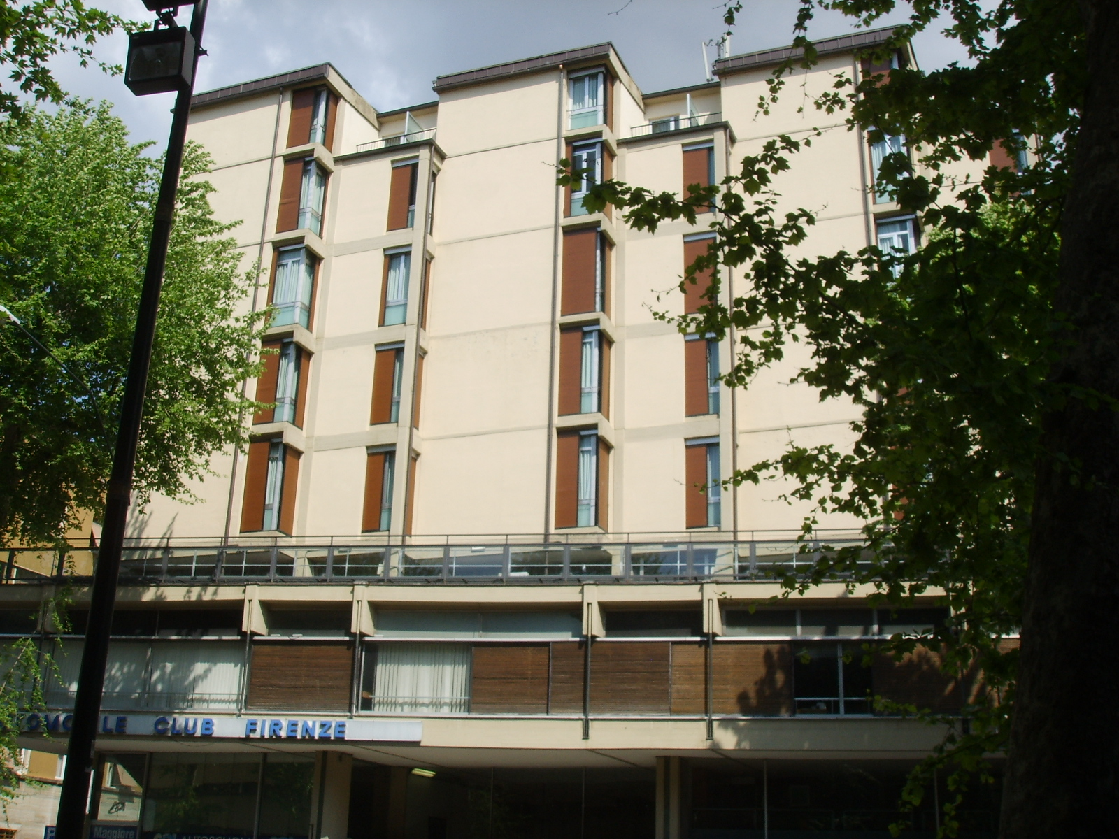 Sede aci